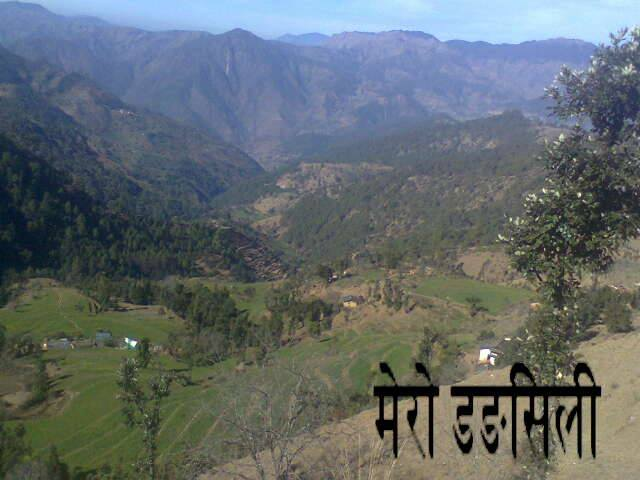 यो गाउँ बैतडी जिल्ला कैलपाल गा बि स वडा न.९ डङसिली हो ।